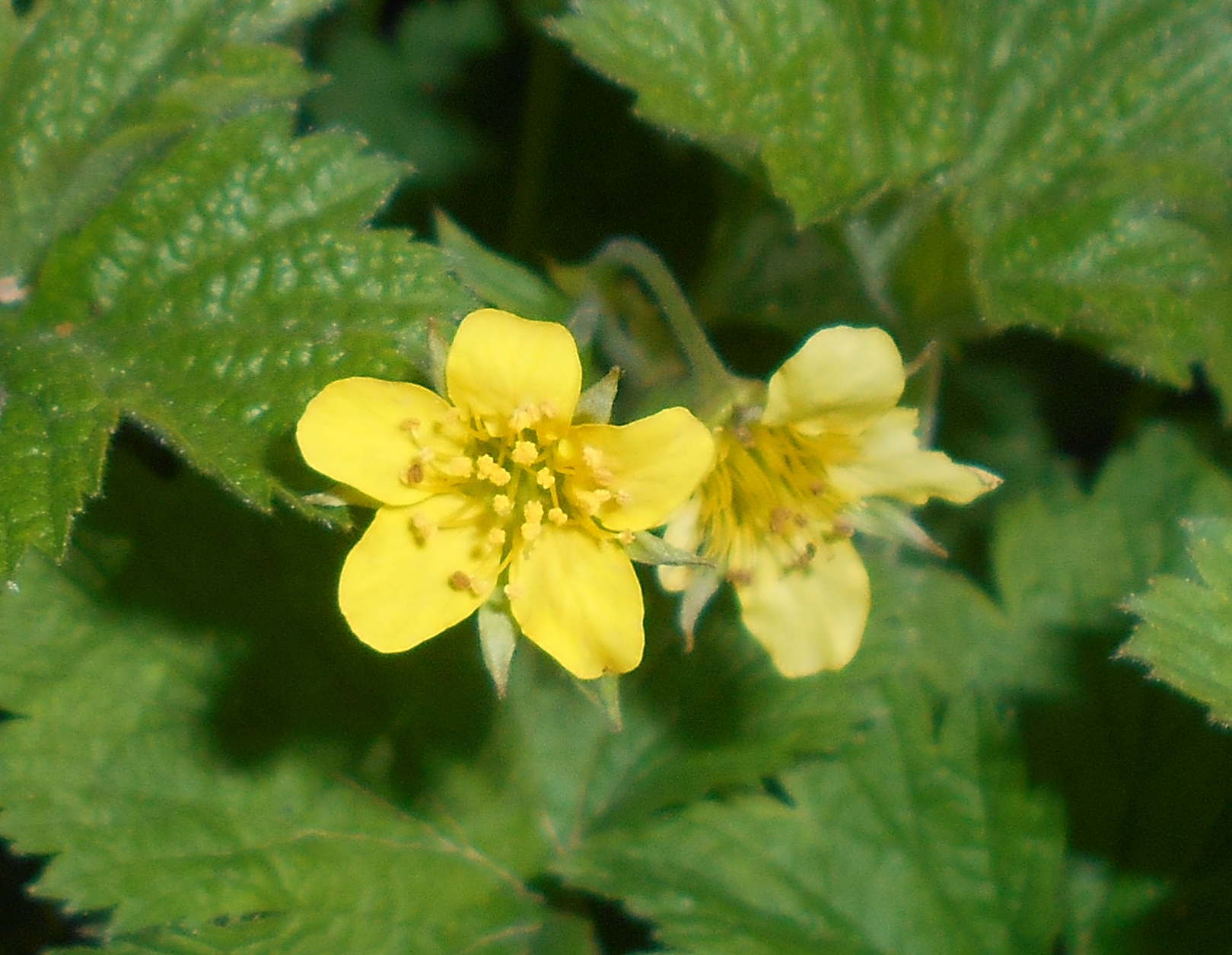 Pragnia kuklikowata (Waldsteinia geoides), Ogród Botaniczny UMCS w Lublinie.